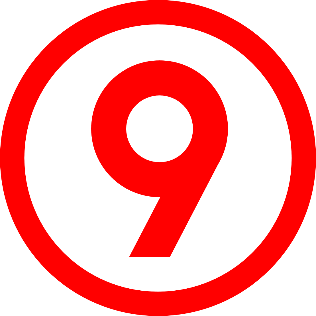 Logo propio de LS 83 TV Canal 9 Buenos Aires, Argentina.